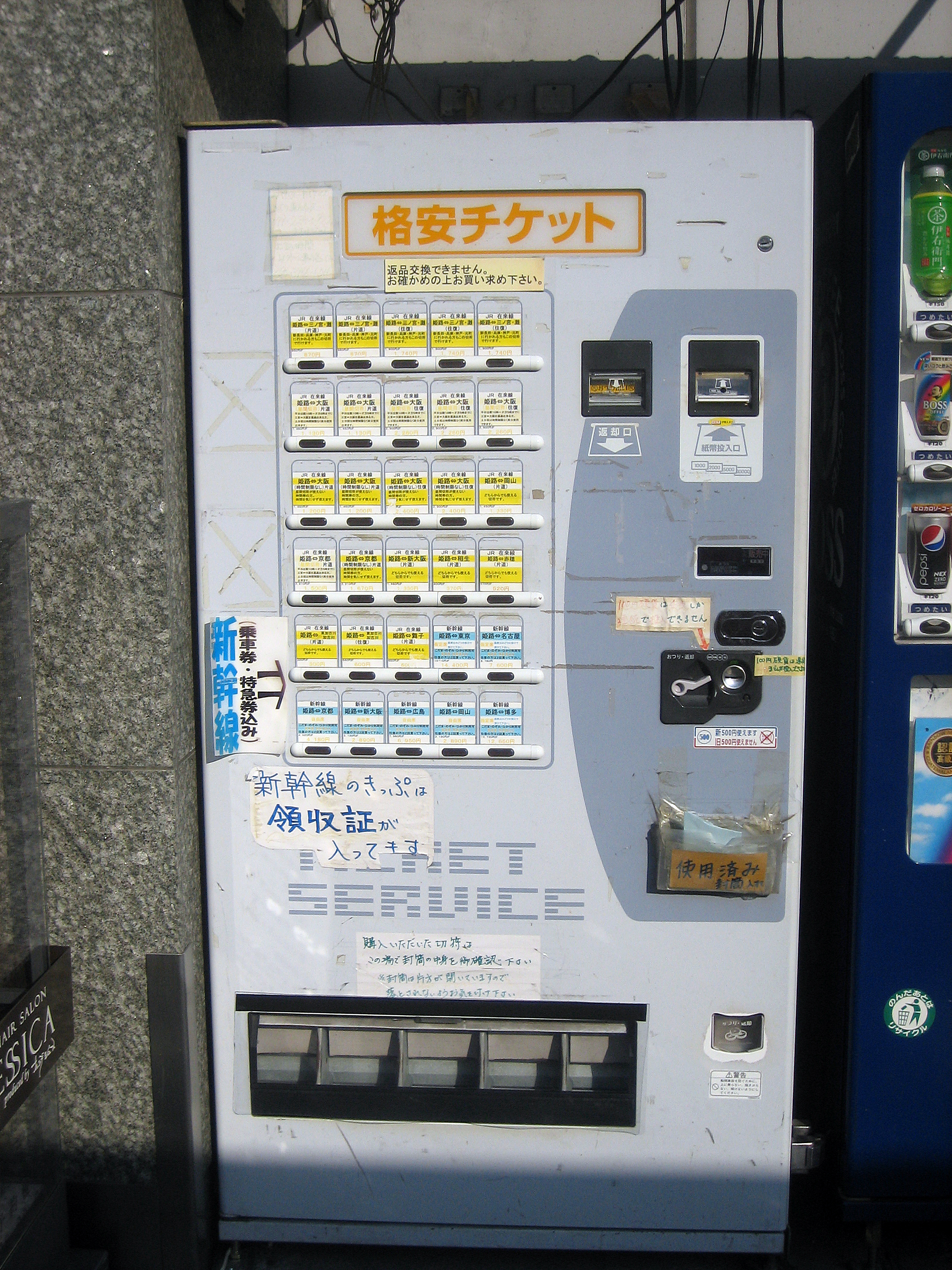 日本にある鉄道の切符などを格安で売っている自動販売機。主に金券ショップの側に設置されている。